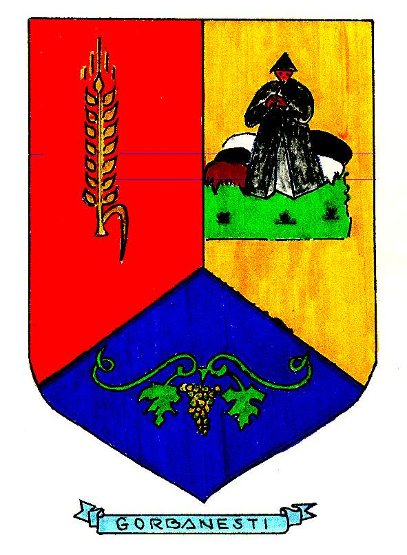 Coat of arms of Gorbănești, Romania